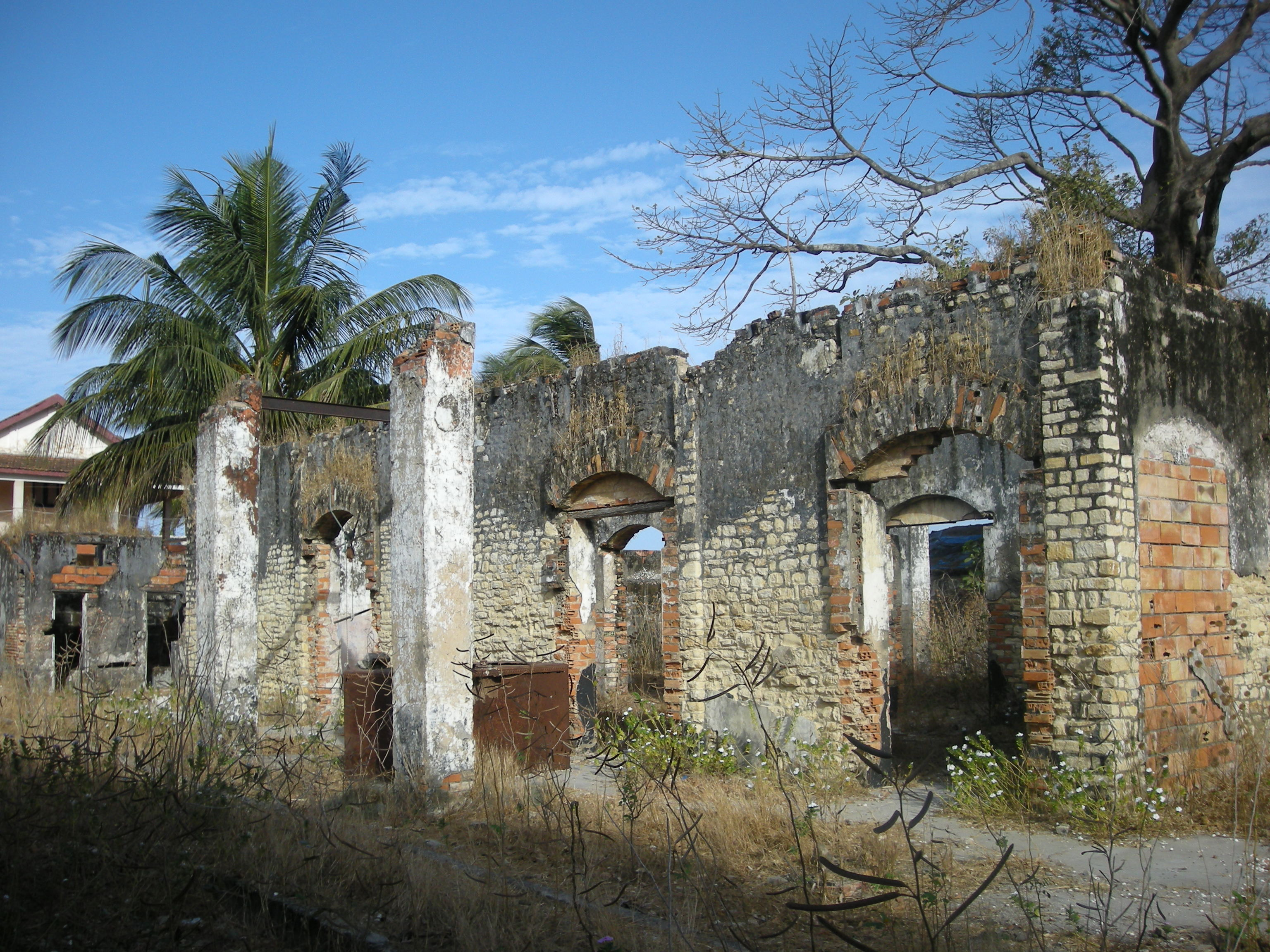 Vestiges de l'ancien comptoir colonial à Carabane (Casamance, Sénégal)